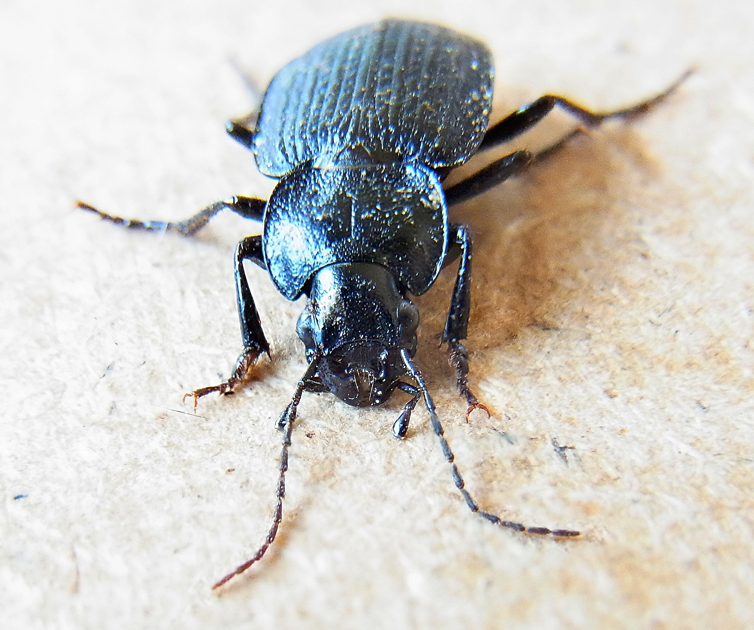 Licinus punctatulus aus Spanien, bei 50792 Chiprana, Zaragosa, am 30. Mai 2013